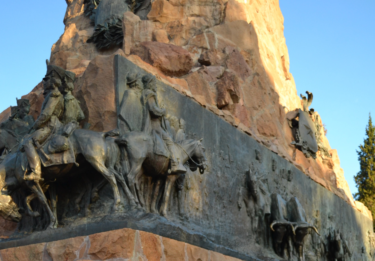 Monumento al Ejercito de los Andes (Cerro de la Gloria). Detalle. Vista semi frental, esquina inferior Oeste